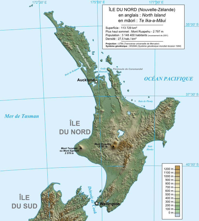 Sujet : Carte physique de l'île du Nord en Nouvelle-Zélande / Map of North Island in New Zealand. Origine des données d'altitude : site FTP SRTM30 (précision de trente secondes d'arc) du SRTM (Shuttle Radar Topography Mission) de la NASA. Visualisation des données d'altitude : Logiciel dlgv32 Pro (version allégée de Global Mapper 9) de l'USGS. Projection : UTM. Système géodésique : WGS84. Logiciels de dessin utilisés : Fond de la carte : . Légendes, lignes et symboles : Inkspace. Format : PNG à partir d'une carte au format SVG Méthode : Carte réalisée en s'inspirant des didactitiels de Sting.